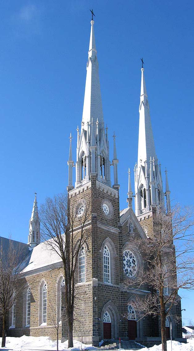 Église de Val-Brillant Photo: S.Lacasse